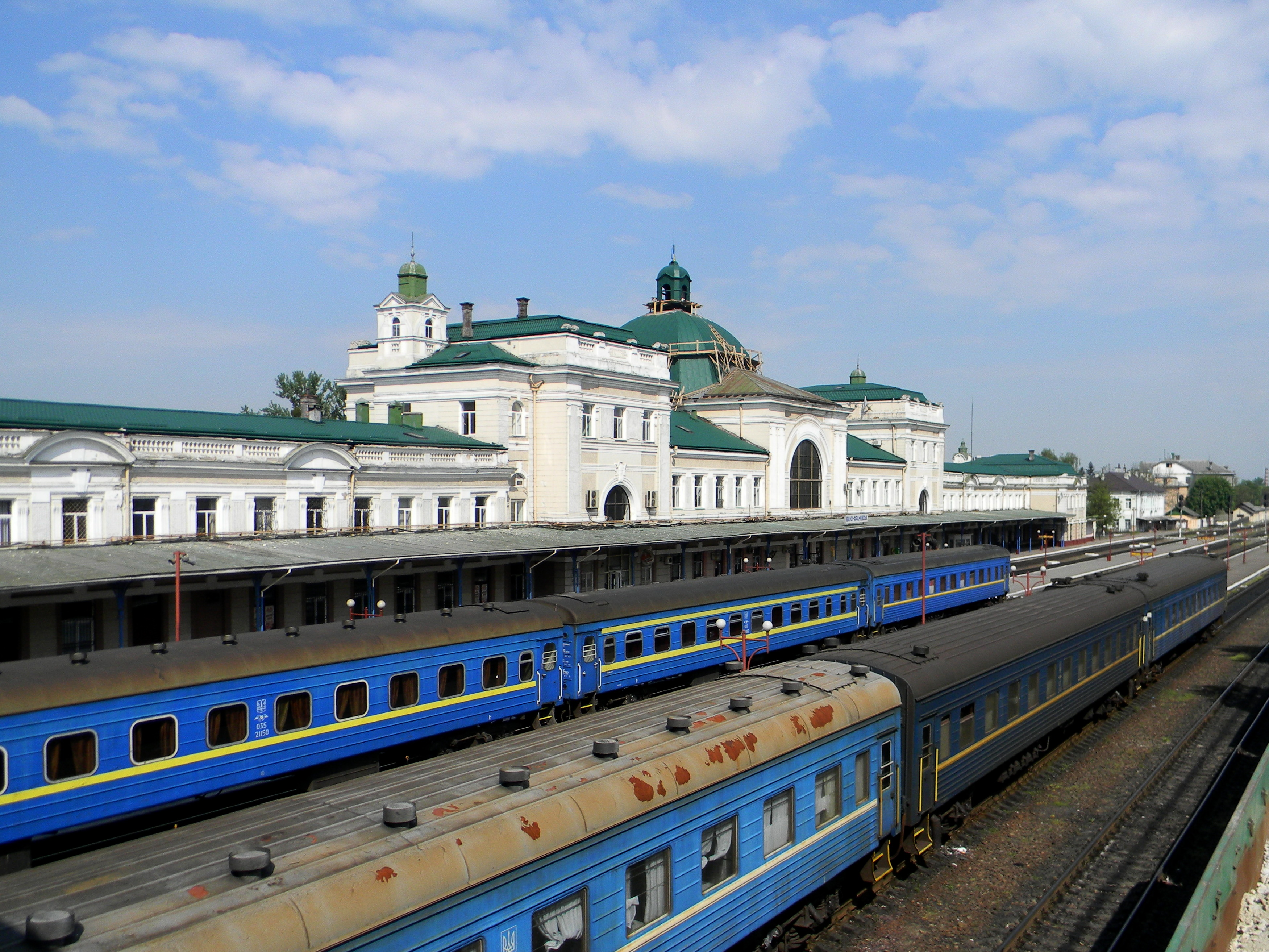 Залізничний вокзал (мур.), Івано-Франківськ, Площа Привокзальна, 8